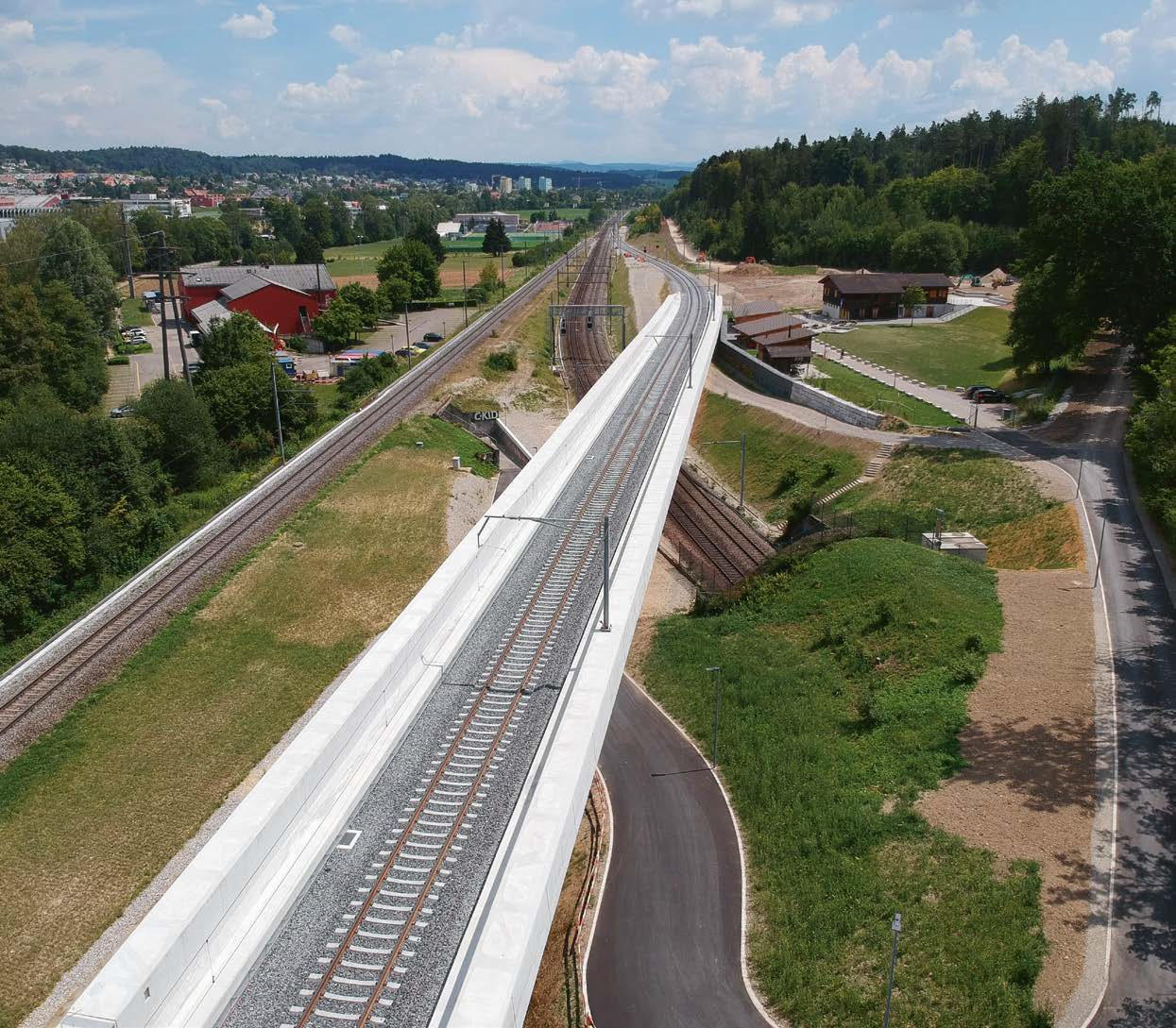 Entflechtungsbauwerk Dorfnest